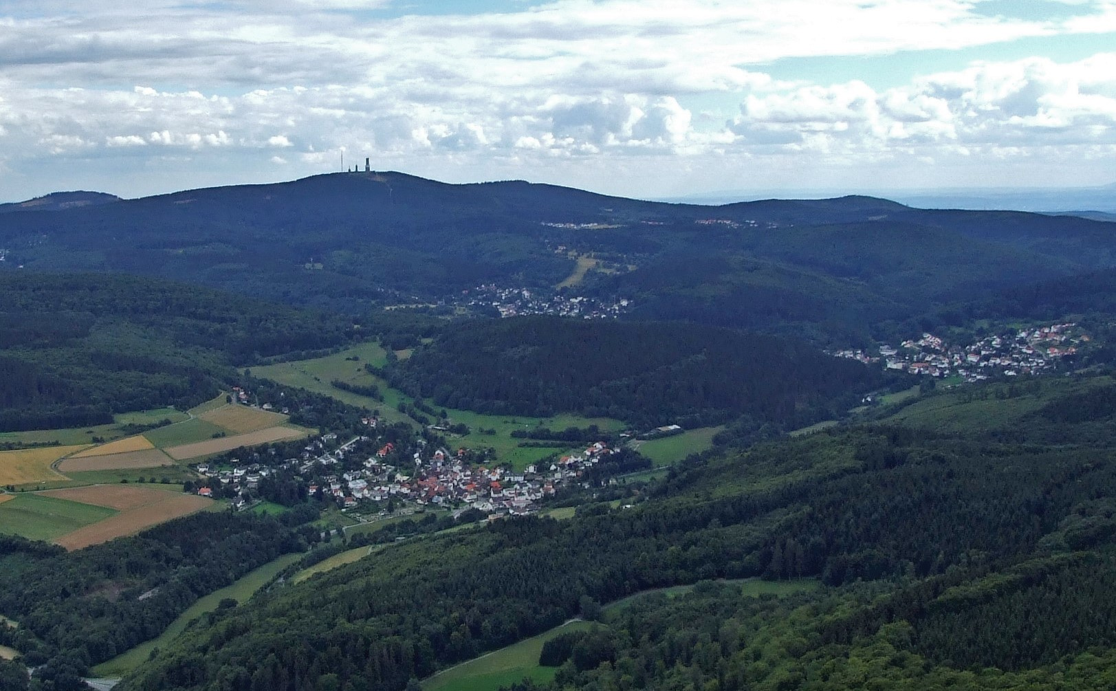 Hochtaunus mit Feldberggipfel, Luftaufnahme vom Hintertaunus (Ausschnitt)